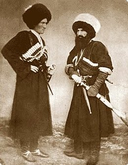 Имам Шамиль и кистинец Багакашвили 1859 год